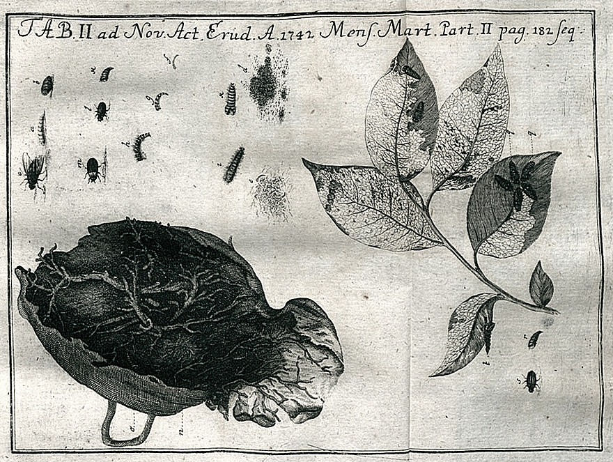 Illustration